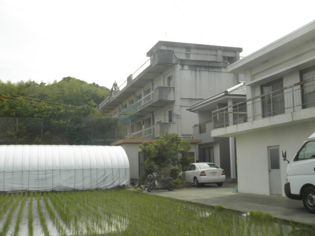 小松島市立芝田小学校